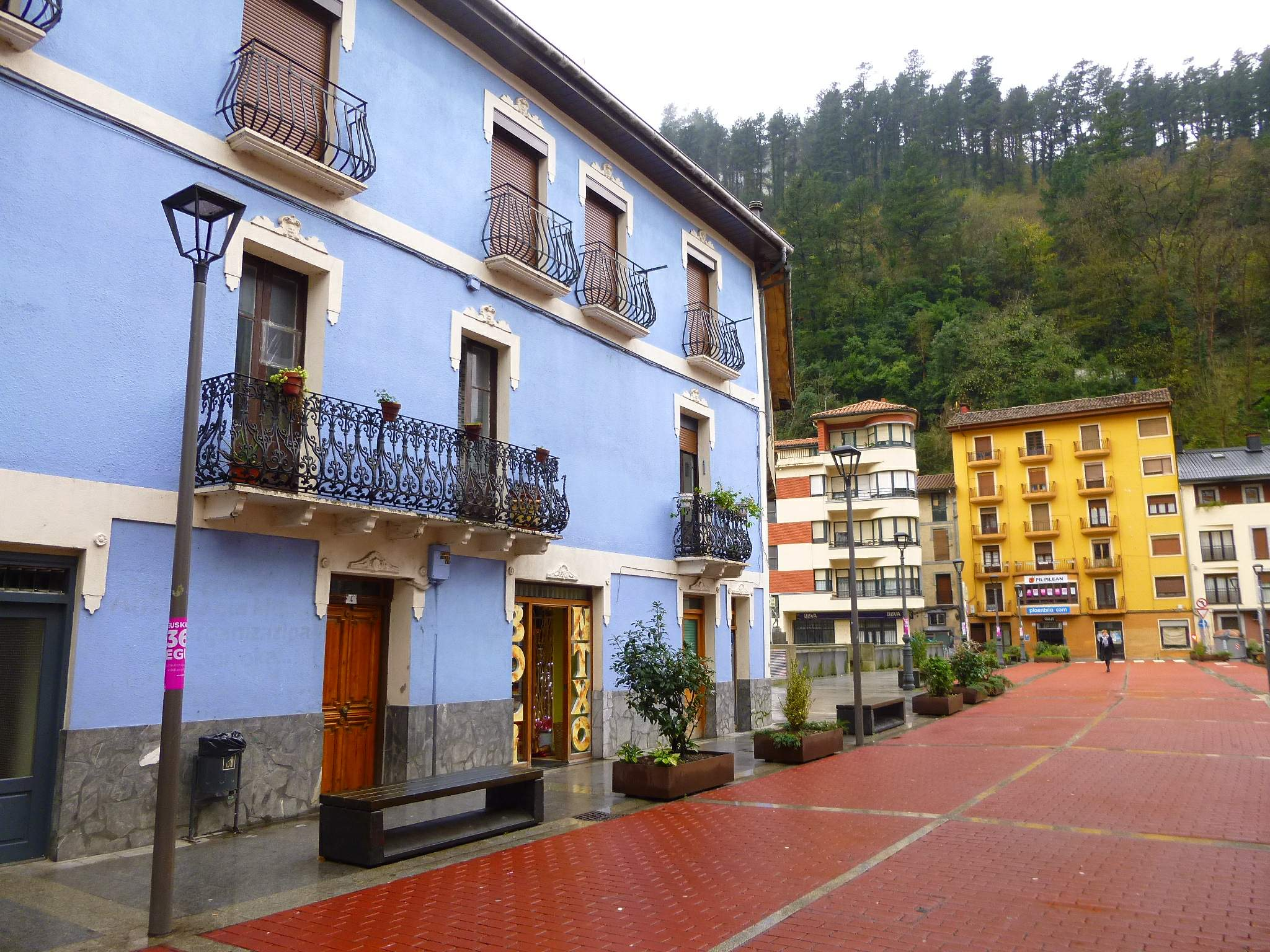 Soraluze (Gipúzkoa)